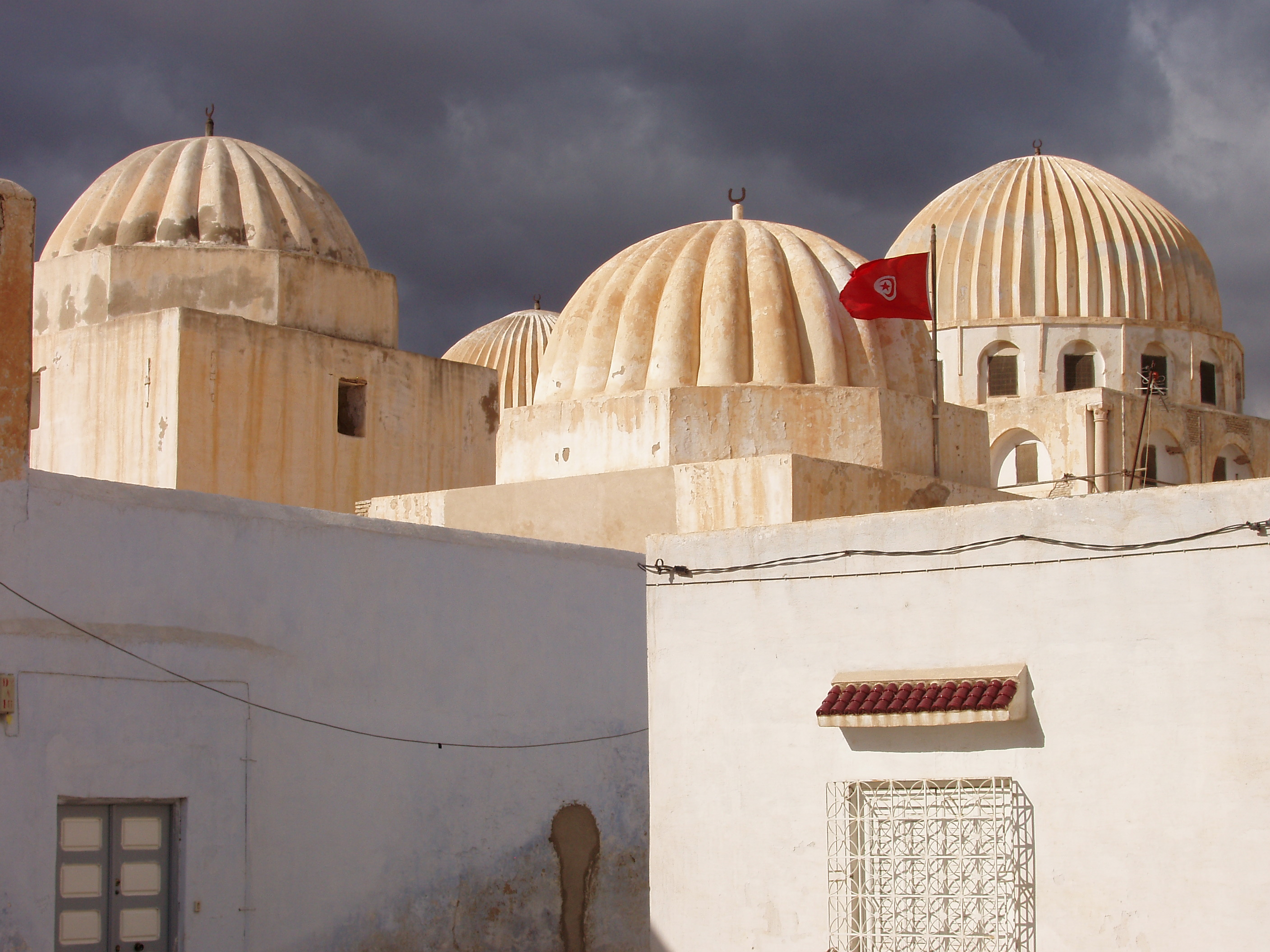 Zaouia Sidi Amor Abbada domes